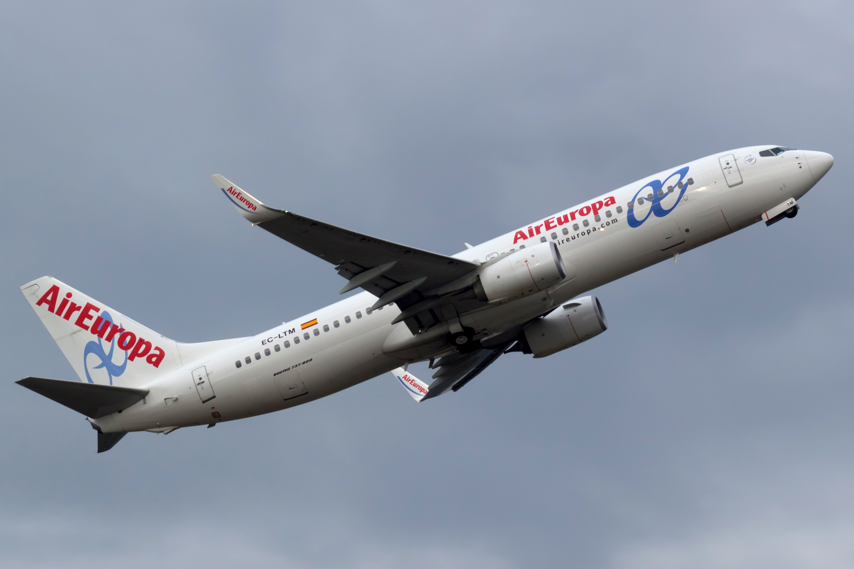 Boeing 737 de Air Europa despegando do aeroporto de Vigo.